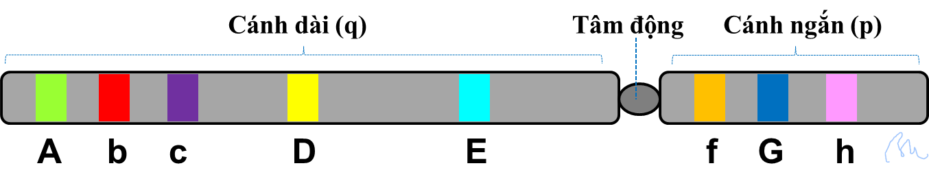 Mỗi nhiễm sắc thể có nhiều gen, mỗi gen có 1 vị trí xác định gọi là lô-cut.